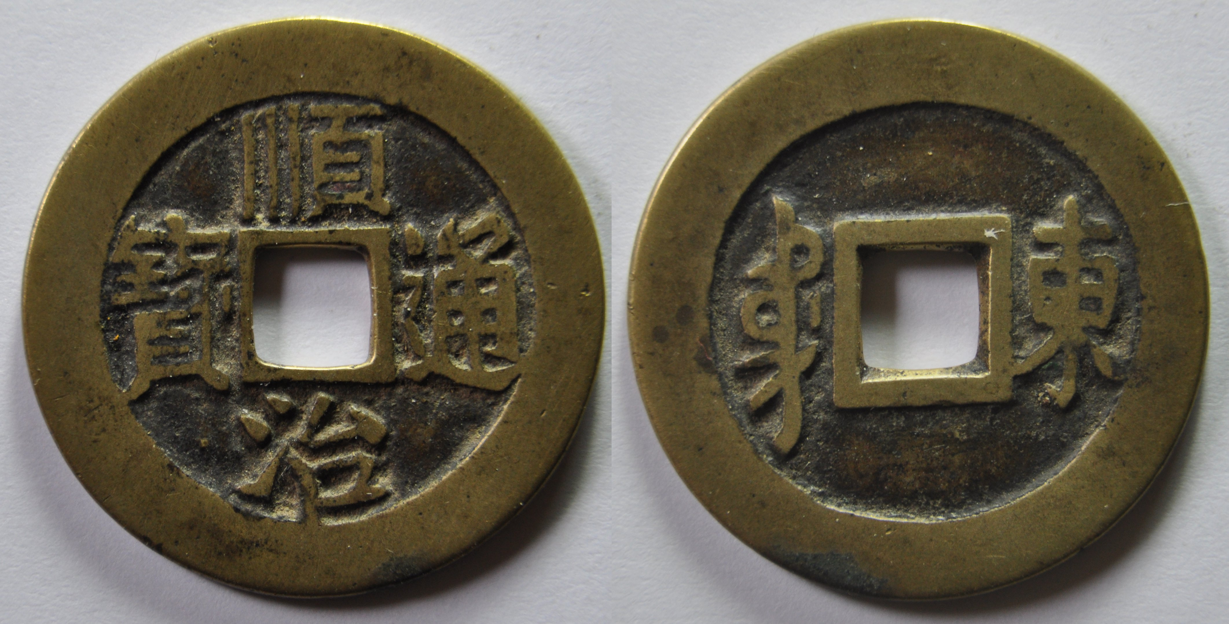 Une monnaie en laiton d'une sapèque (1 cash) de l'empereur Shi Zu (1644-1661), ère Shun Zhi de la dynastie Qing (1644-1912). La monnaie se lit en croix. A/ Shun Zhi tong bao (Monnaie courante de Shun Zhi) R/ Dong en écriture mandchoue à gauche, en caractère chinois à droite pour l'atelier de Jinan au Shandong Dimension : 27,7 mm Poids : 5,2 g. Remarque : En 1657, le poids est augmenté à 1,4 qian (ca 5,2 g.) et le nom de l'atelier est rajouté en mandchou au revers à gauche avec le nom en caractère chinois à droite. Il s'agit d'un bel exemplaire correspondant bien à la norme. Ces monnaies auraient été émises entre 1660 et 1661. La composition est de 70% de cuivre et 30% de zinc sous le règne de cet empereur. Référence : H22.76 Indice de rareté : 15, très commune d'après D.Hartill.